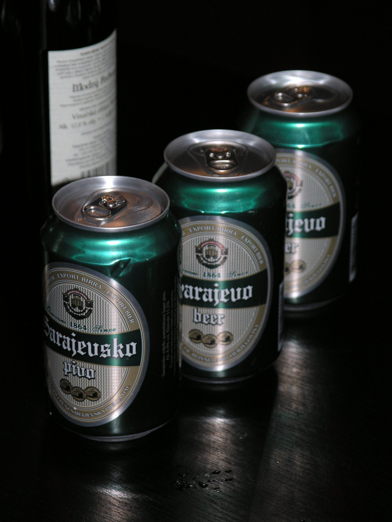 plechovky Sarajevského piva